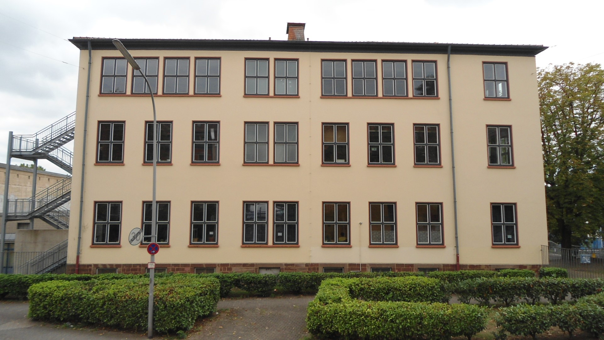 Pestalozzischule Saarbrücken-Malstatt